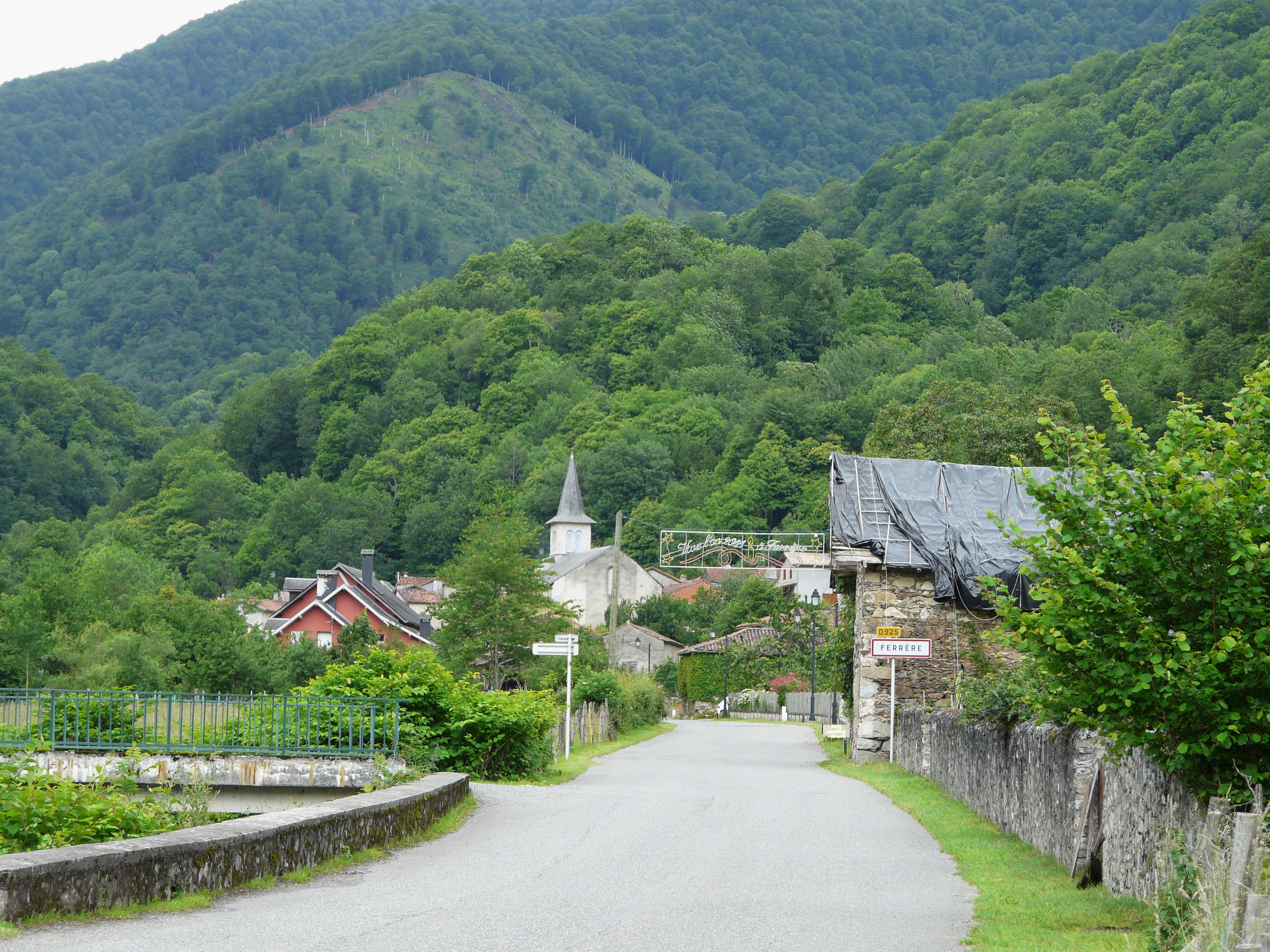 La route départementale 925 et le village de Ferrère vus depuis le nord-est, Hautes-Pyrénées, France.